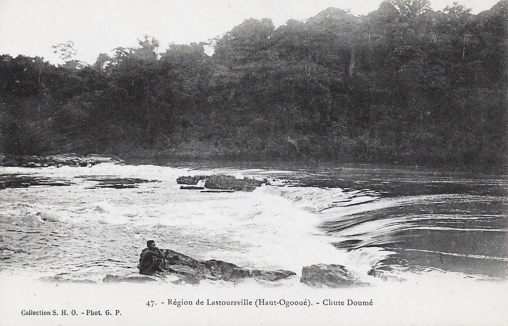 Région de Lastoursville (Haut-Ogooué). Chute Doumé. Collection S.H.O. G.P. phot.